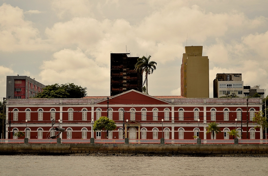 Prédio do Ginásio Pernambucano na Rua da Aurora. Recife - PE